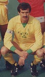 Image de l'équipe de la Jeunesse sportive Kabylie; sous le nom de la Jeunesse Electronique de Tizi-Ouzou en 1986De Gauche à Droite :Debout : Larbes - Adghigh - Amara - Heffaf - Sadmi - Belahcène Assis : Bahbouh - Menad - Fergani - Abdeslam - Bouiche